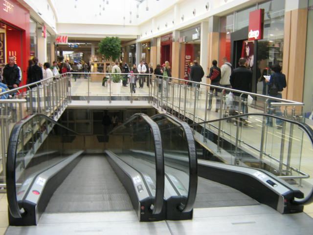 Ruchome taśmy (odpowiednik ruchomych schodów) w Galerii Białystok